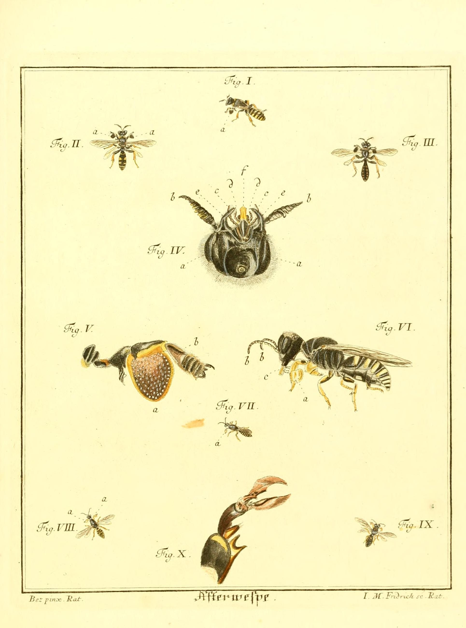 J.i.~ VUIX Hut Mfifvwe\vp l II Fr, I ■.. ! Hat